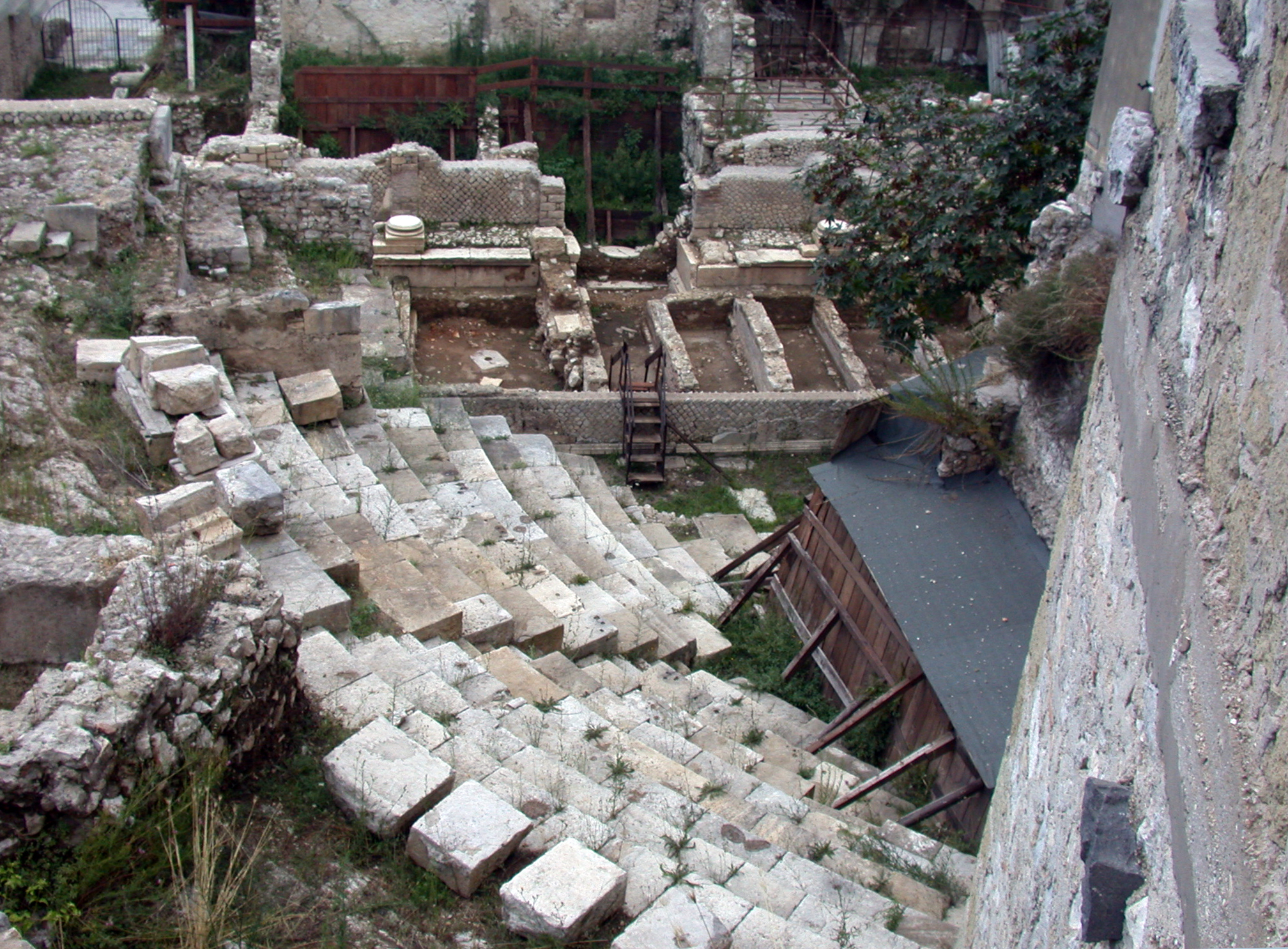 Terracina (provincia di Latina, Lazio, Italia), città alta, resti del Teatro romano.